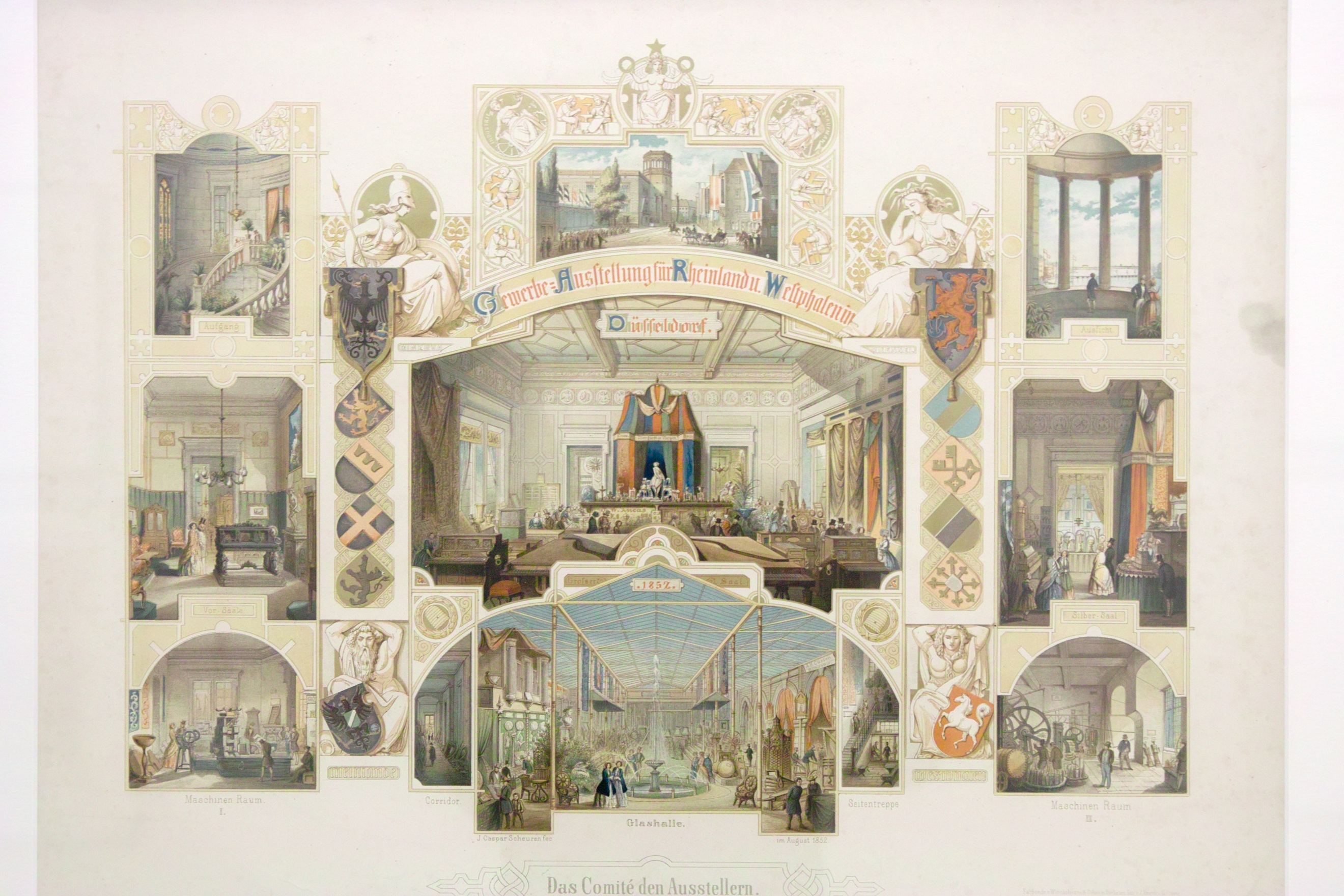 MKG: Caspar Scheuren. Gewerbeausstellung für Rheiland und Westphalen in Düsseldorf. 'J. Caspar Scheuren fec im August 1852. Farbdruck v. Winckelmann & Söhne in Berlin' . Chromolithographie, Berlin 1852. Die „Provinzial-Gewerbeausstellung für Rheinland und Westfalen“ in Düsseldorf fand vom 15. Juli bis 1. Oktober 1852 statt in den Räumen des Düsseldorfer Schlosses statt.